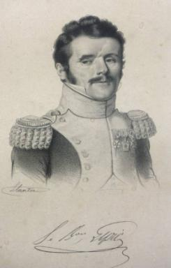 portrait du Baron Joachim Hippolyte Lepic, Maréchal de Camp (1765-1835)